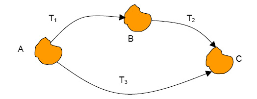 Simmetria Fisica